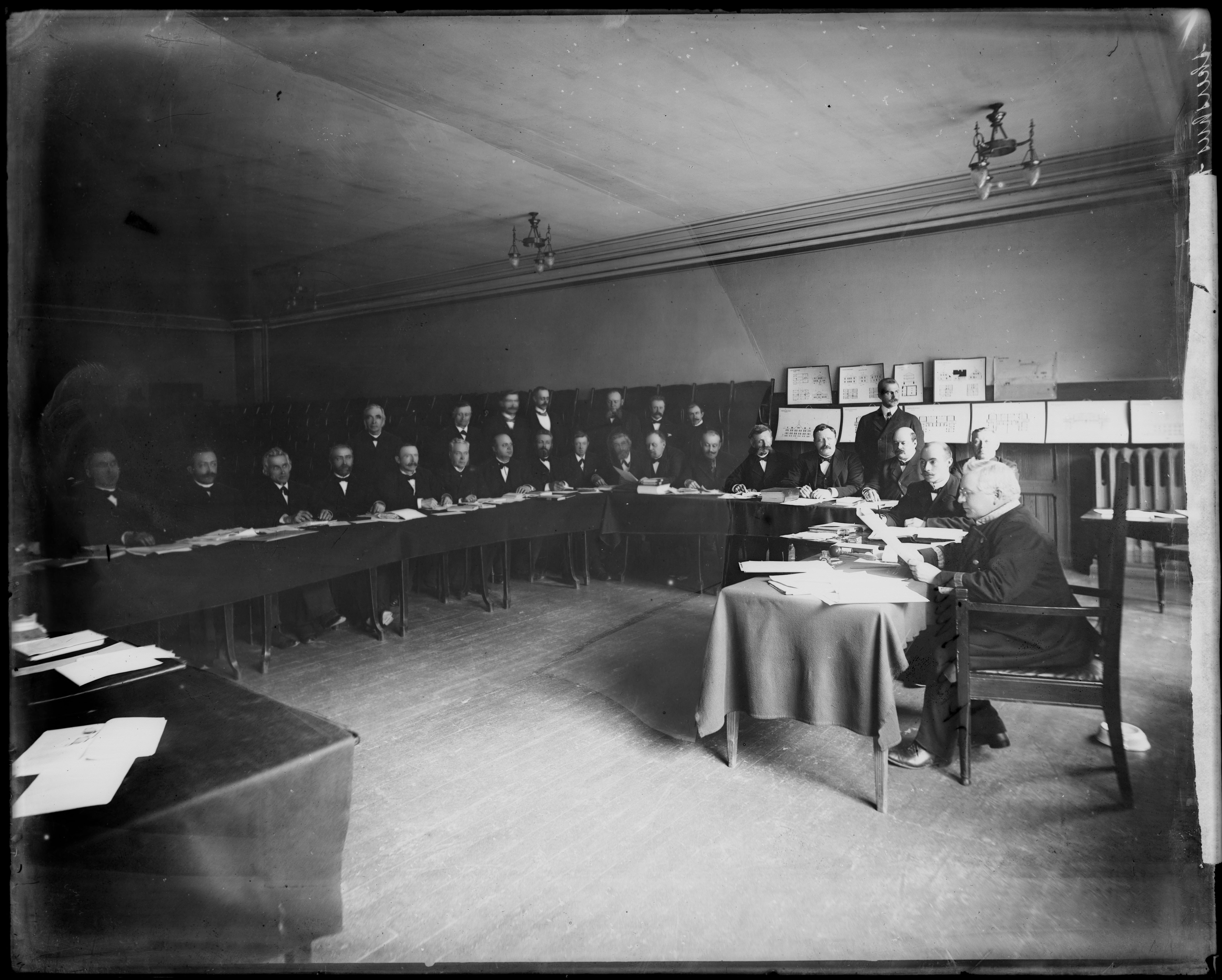 Bildet er hentet fra Nasjonalbibliotekets bildesamling. Anmerkninger til bildet var: Påskrift arkivark: Akershus Amtsthing 1903 Eldste arkivnummer: 512 Oslo, Oslo